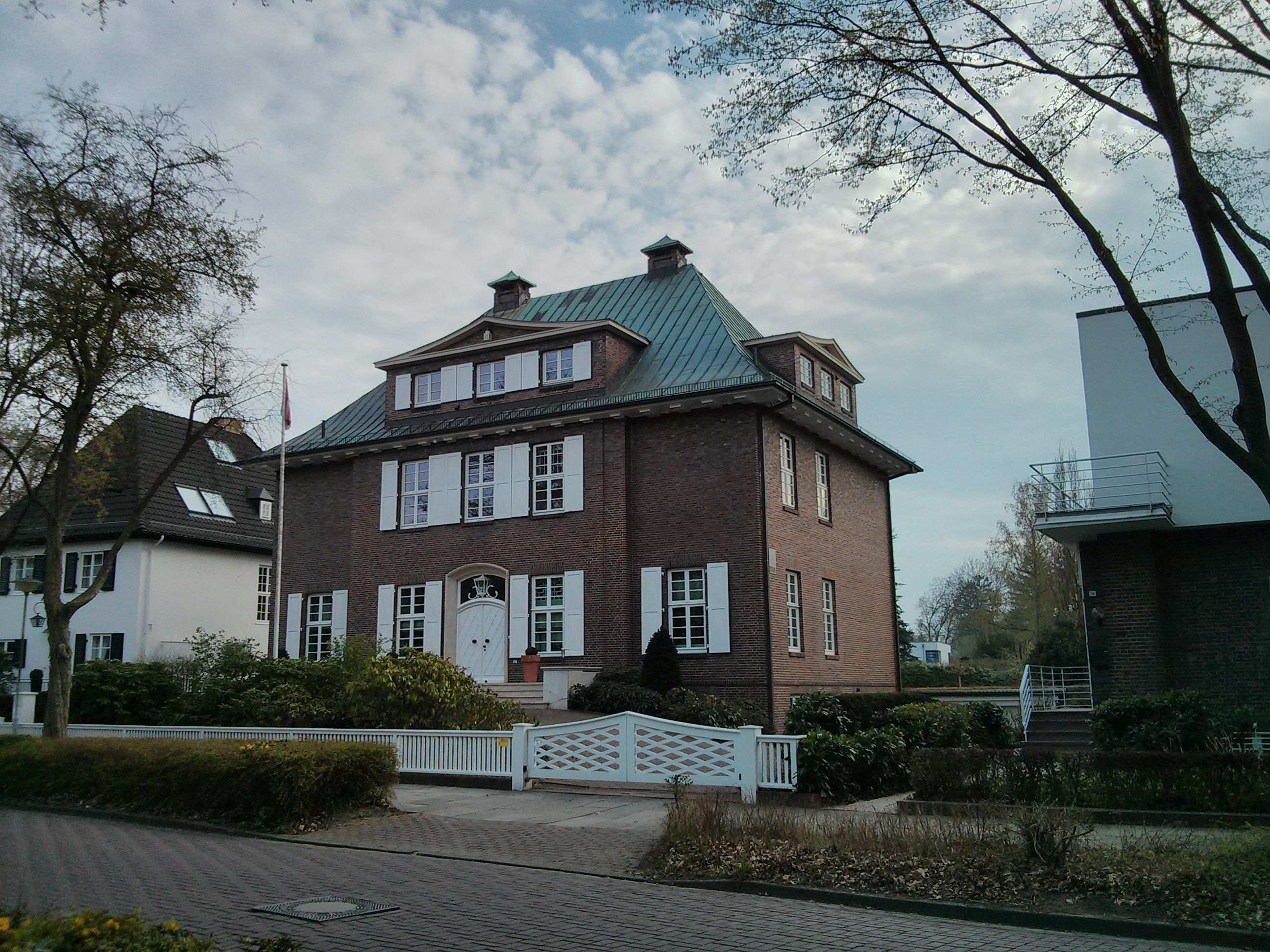 Haus Meyer in Bremen, Unter den Eichen 12 Das abgebildete Objekt ist ein geschütztes Kulturdenkmal in der Freien Hansestadt Bremen, mit der Nr. 1181 beim Landesamt für Denkmalpflege registriert.